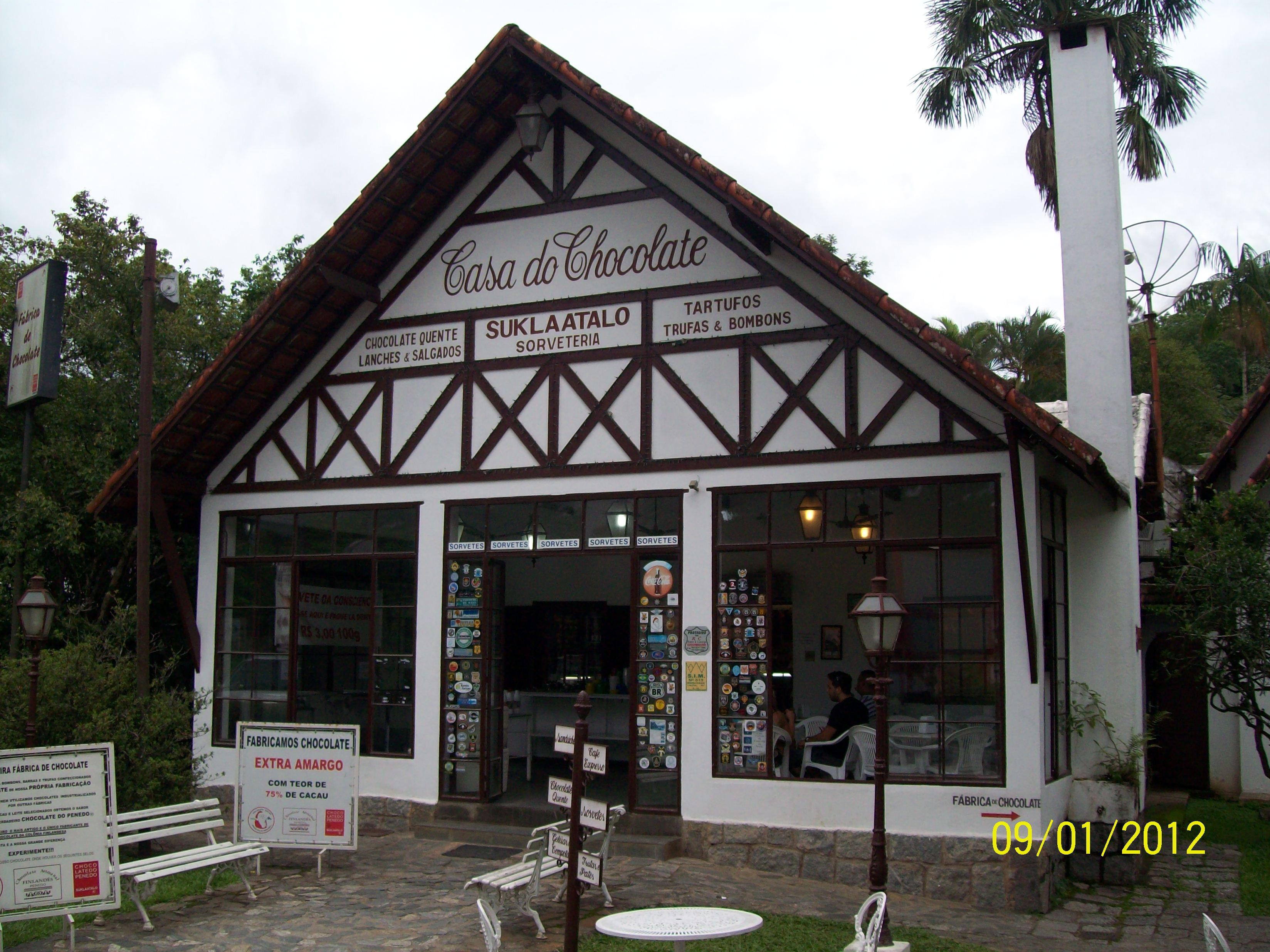 Penedo RJ Brasil - Fabrica de Chocolate